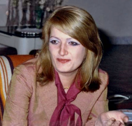 Zoia Ceausescu